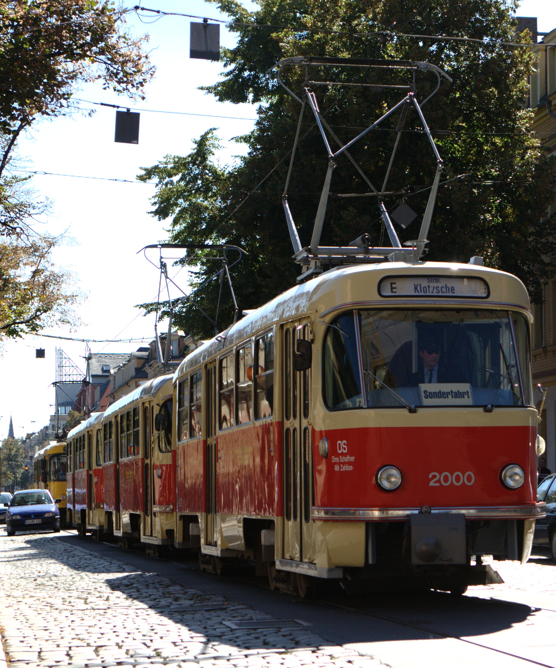 Tatra T4 2000 in Dresden dreiteilig in der Trachenberger Straße auf dem Weg zum Betriebshof Tachenberge; im Hintergrund der markante Turm des Bürogebäudes Riesaer Straße 5 sowie der Turm der Pieschener Markuskirche